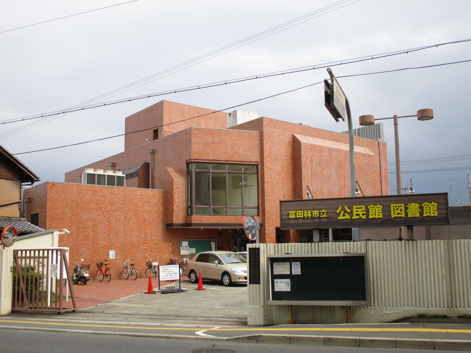 富田林市立中央図書館